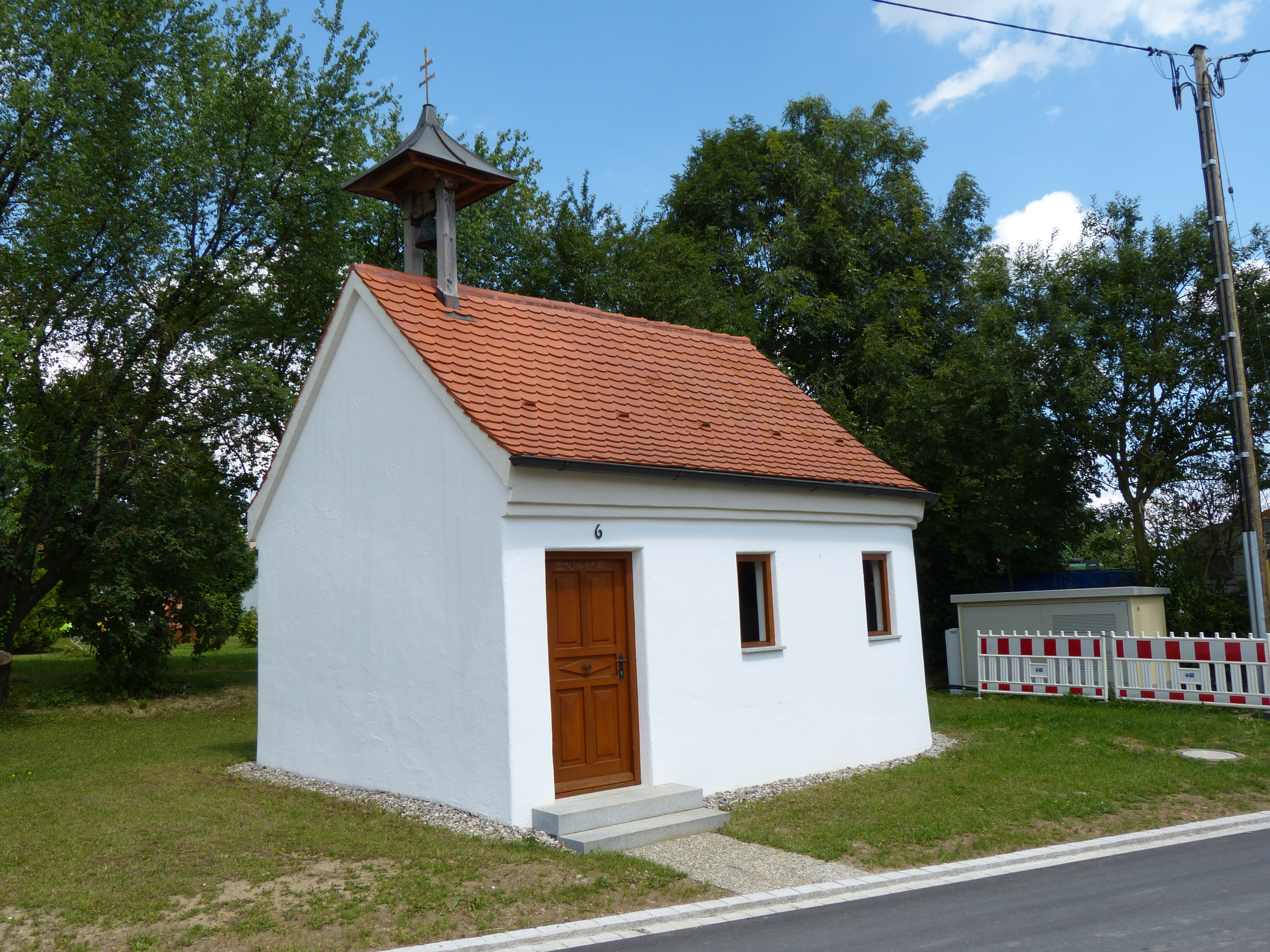 Hl. Dreifaltigkeit, Wideregg, Landkreis Unterallgäu, Bayern